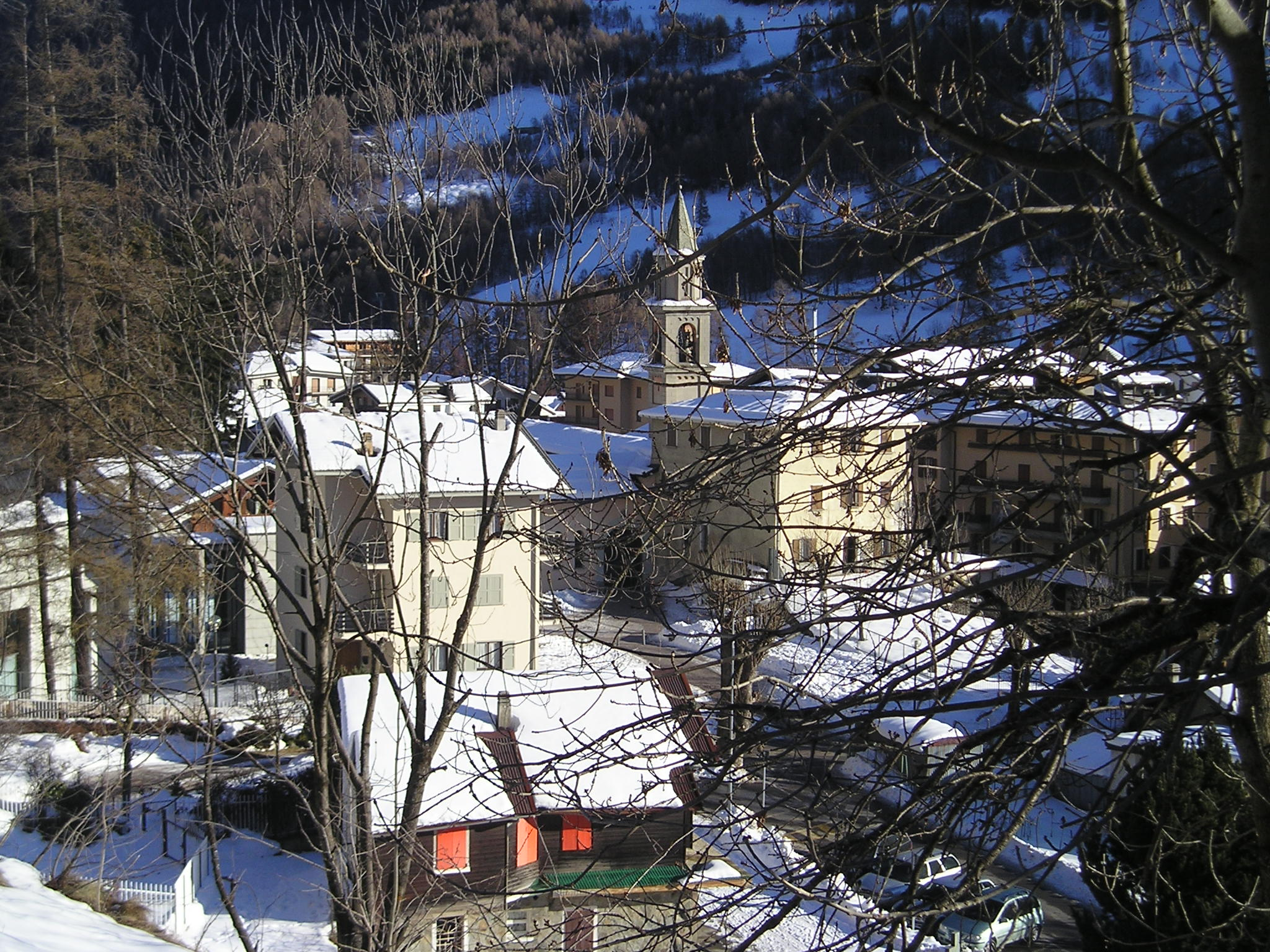 centro del Paese di Aprica, autore Massimo Macconi